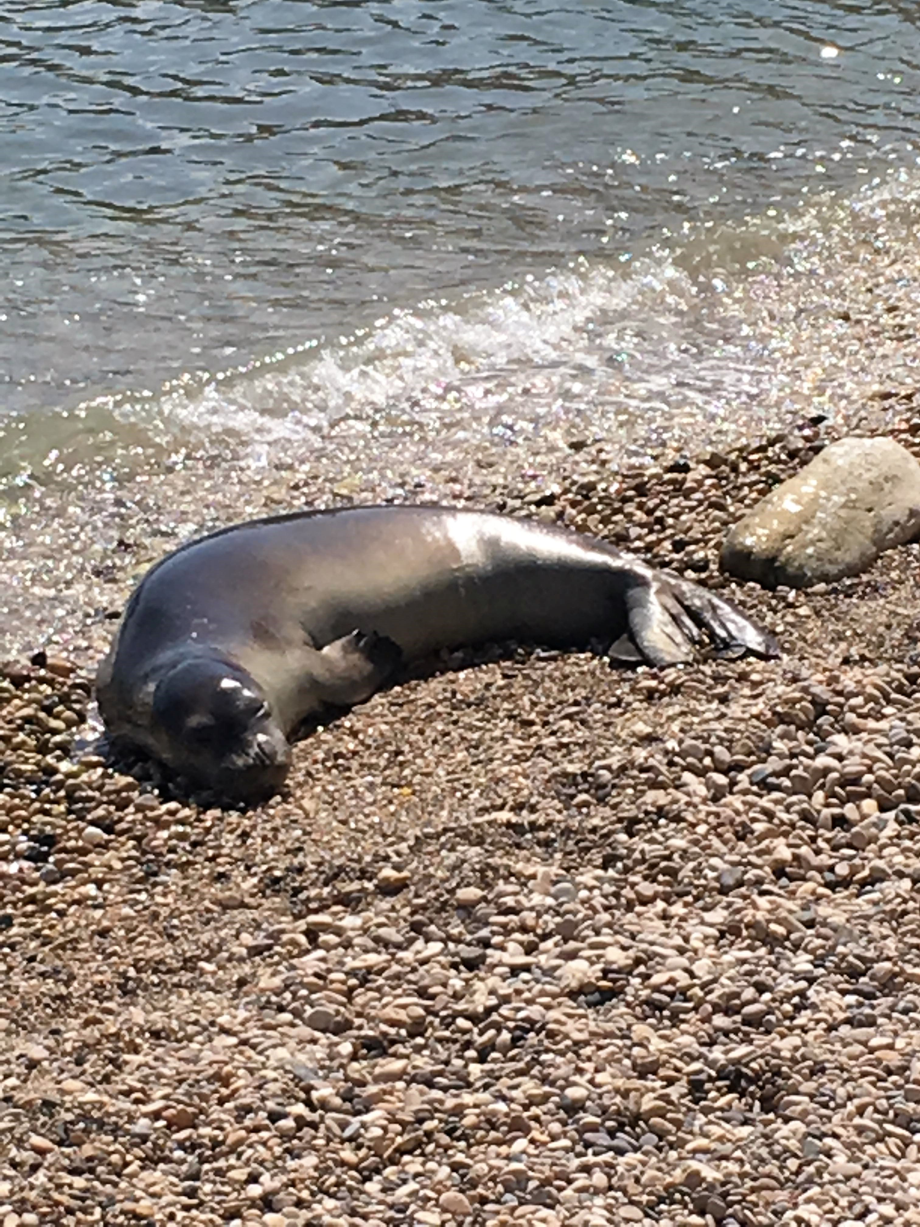 Ο Billy (Μεσογειακή φώκια monachous monachous) ξεκουράζεται κοντά στο λιμάνι (Πατητήρι). This is a photography of Natura 2000 protected area with ID GR1430004